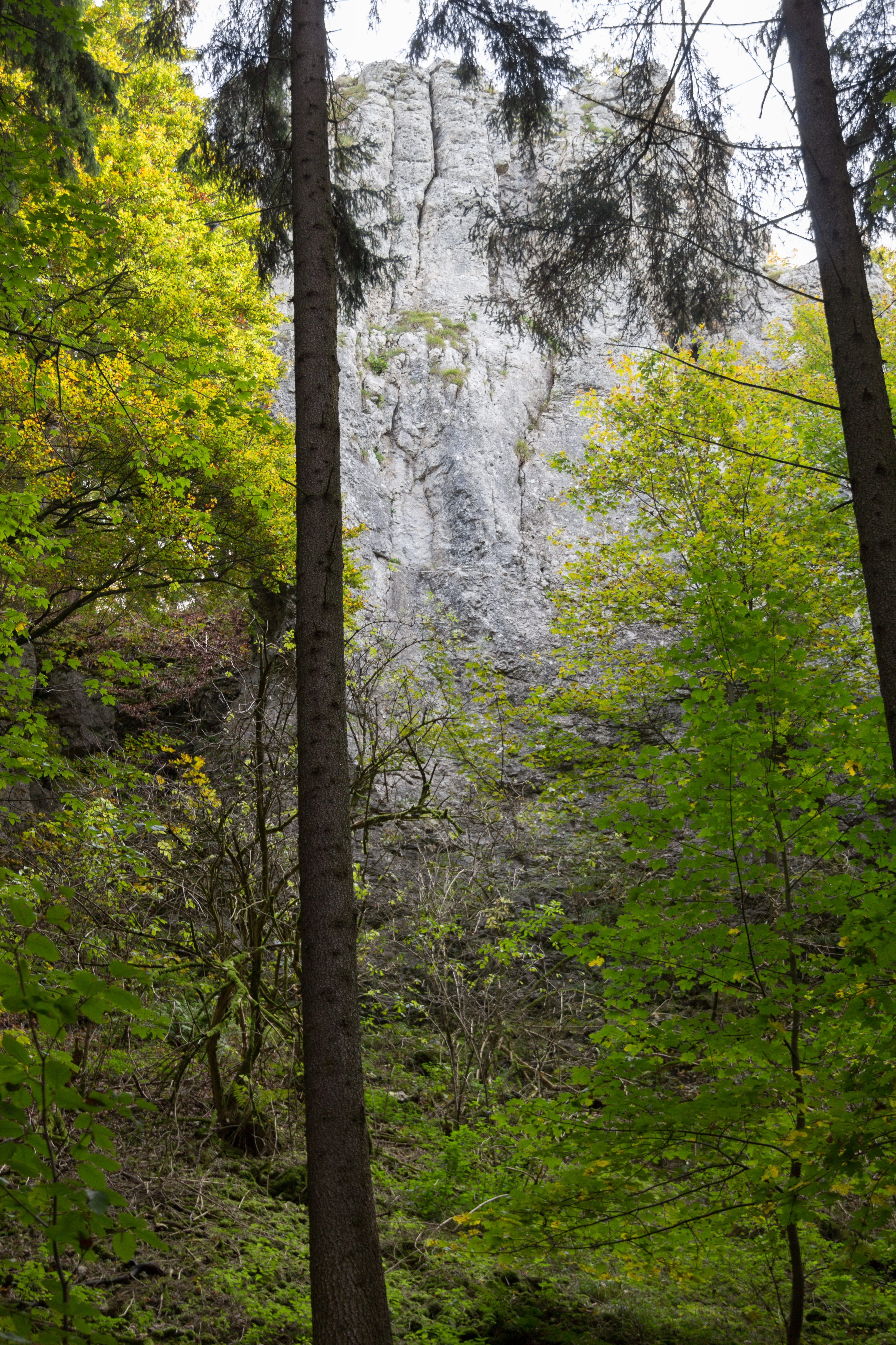 Düsselbacher Wand, Felswand, Vorra, Geotop